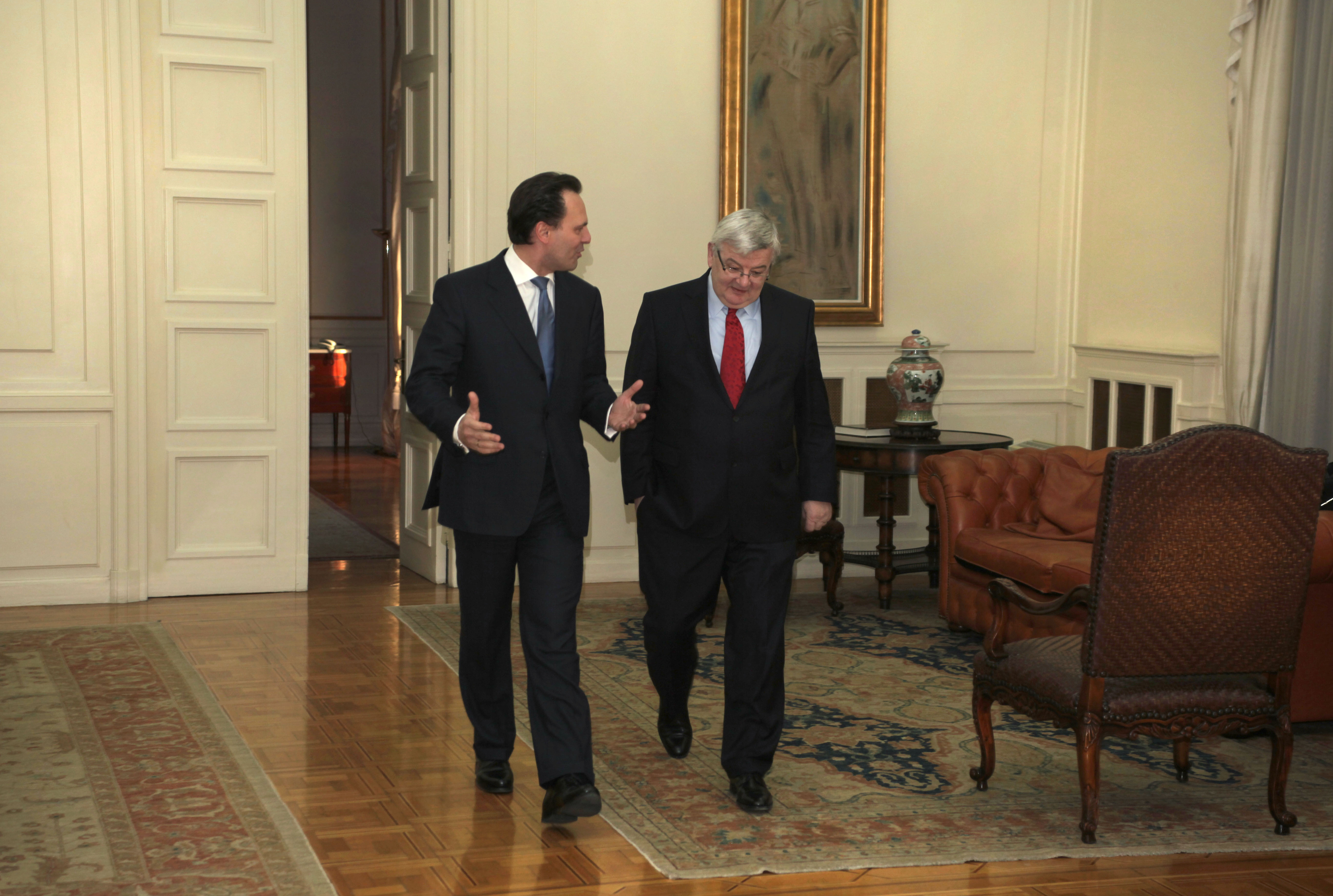 Την Τρίτη 8 Φεβρουαρίου 2011 και ώρα 17:00, ο Υπουργός Εξωτερικών Δημήτρης Δρούτσας συναντήθηκε στο Υπουργείο Εξωτερικών με τον Joschka Fischer, πρώην Υπουργό Εξωτερικών της Γερμανίας On Tuesday 8 February 2011 at 17:00, the Minister of Foreign Affairs Dimitris Droutsas met at the Ministry with Joschka Fischer, former German Minister of Foreign Affairs